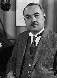 Anton Karl Gebauer (1872 - 1942), Rakouský cestovatel, etnograf a spisovatel.